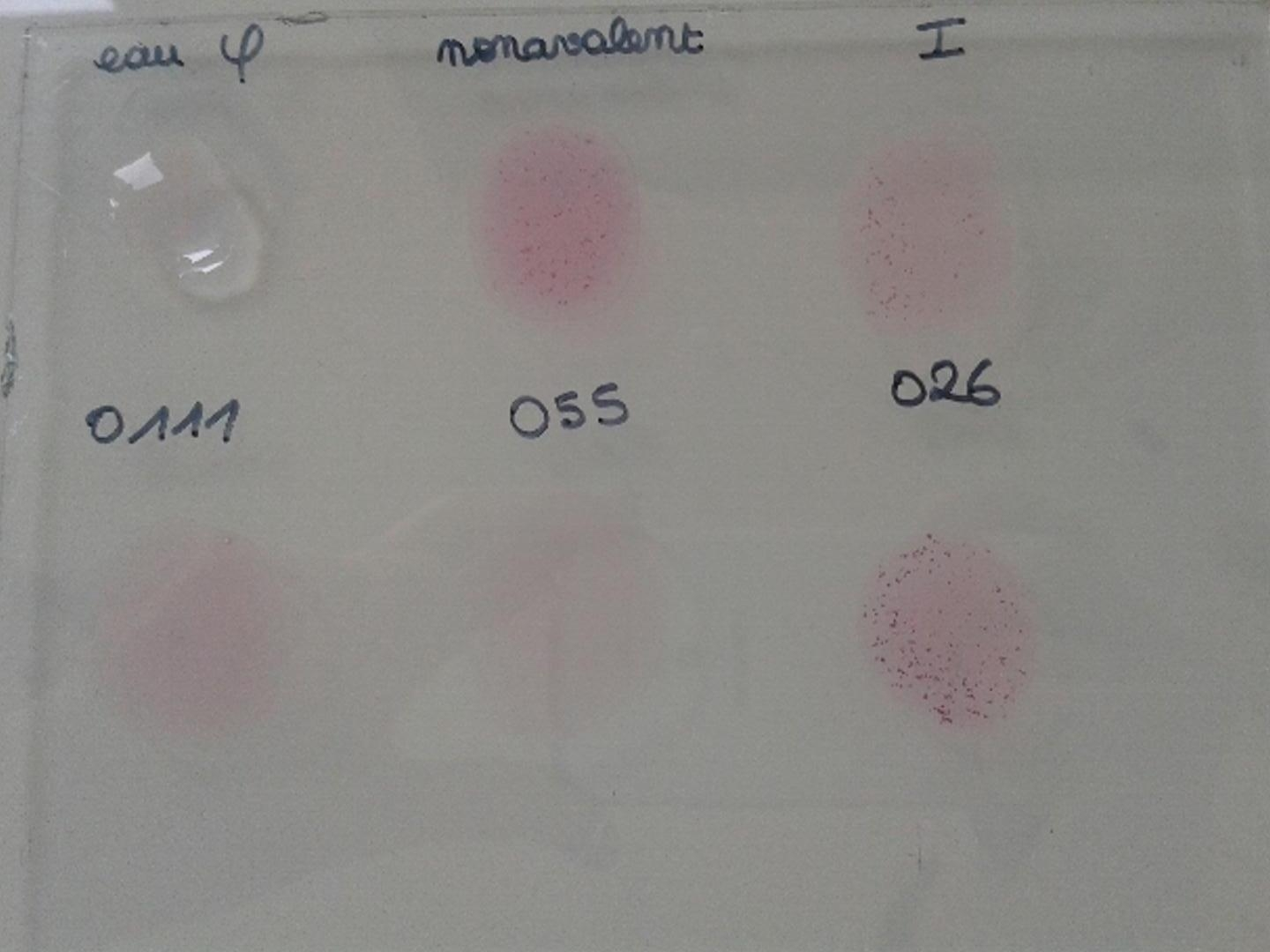 Sérogroupage de E. coli entéropathogène (EPEC)